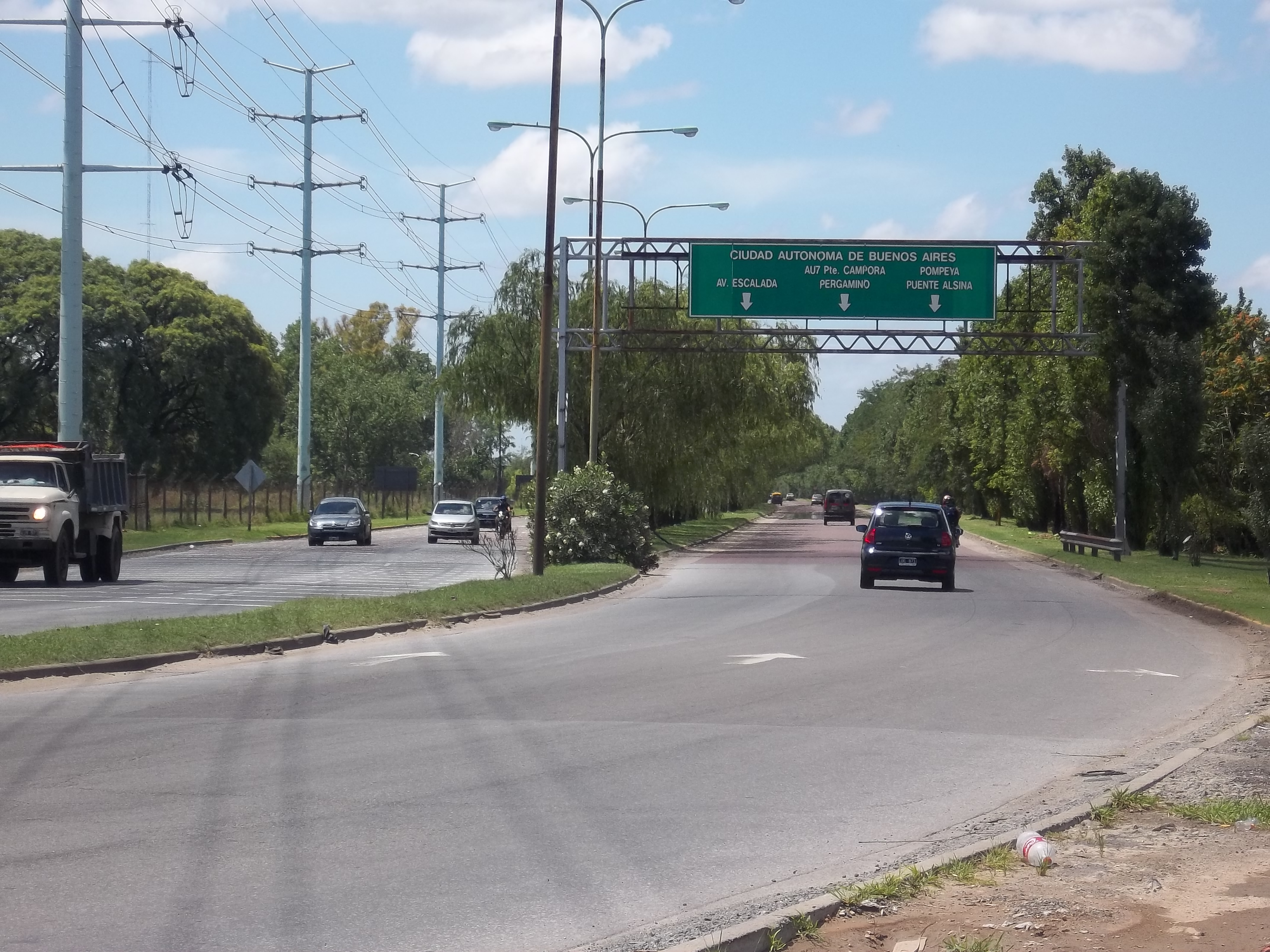 Avenida 27 de Febrero desde el puente La Noria, en Villa Riachuelo, ciudad de Buenos Aires, Argentina.